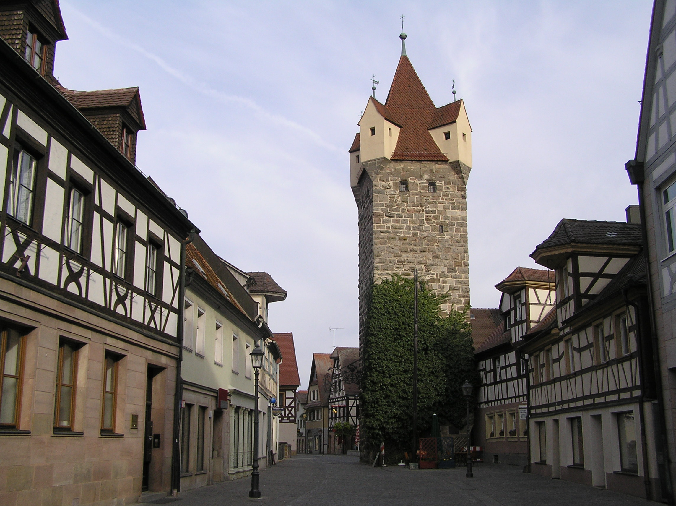 Der östliche Teil der Herzogenauracher Hauptstraße mit dem mittelalterlichen Fehnturm